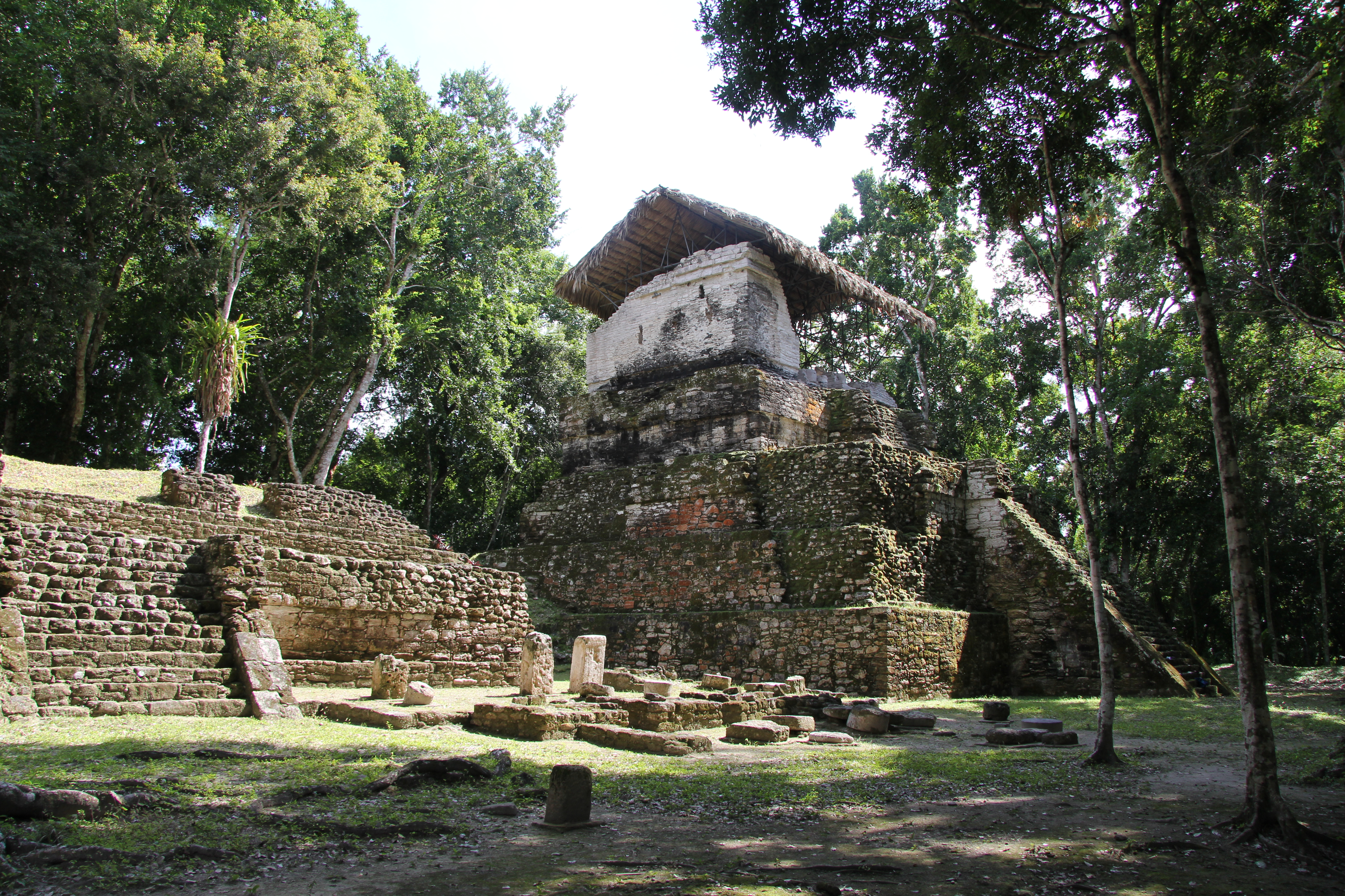 Ruinas mayas en la isla Topoxté, Parque Yaxhá Nakum Naranjo, Reserva de la Biosfera Maya, Petén, Guatemala